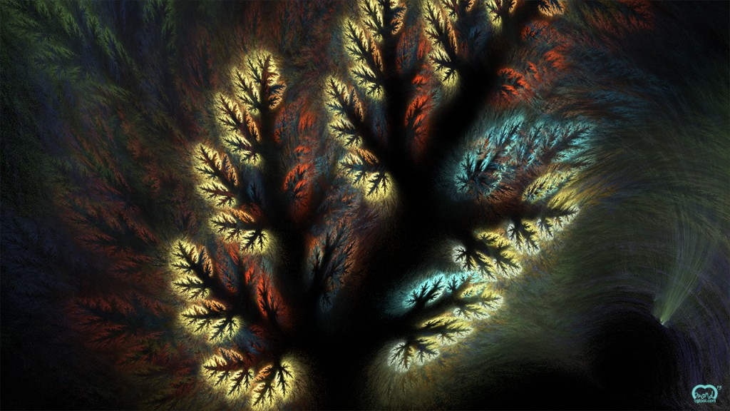 프랙탈특성인 전체와 부분이 유사한 이미지의 반복